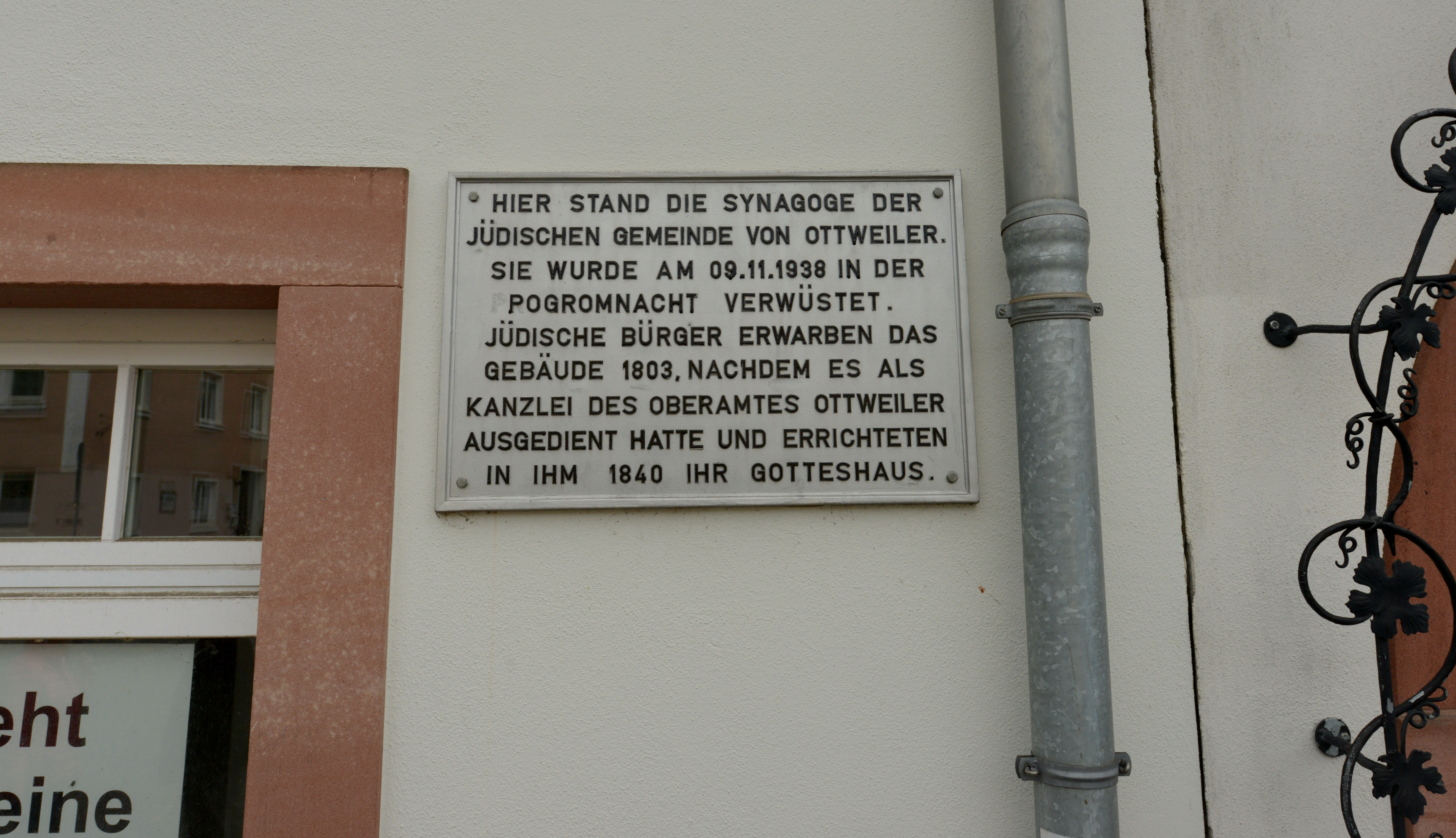 Hinweistafel zum Standort der ehemaligen Synagoge in Ottweiler, Schlossplatz 4 (2018).